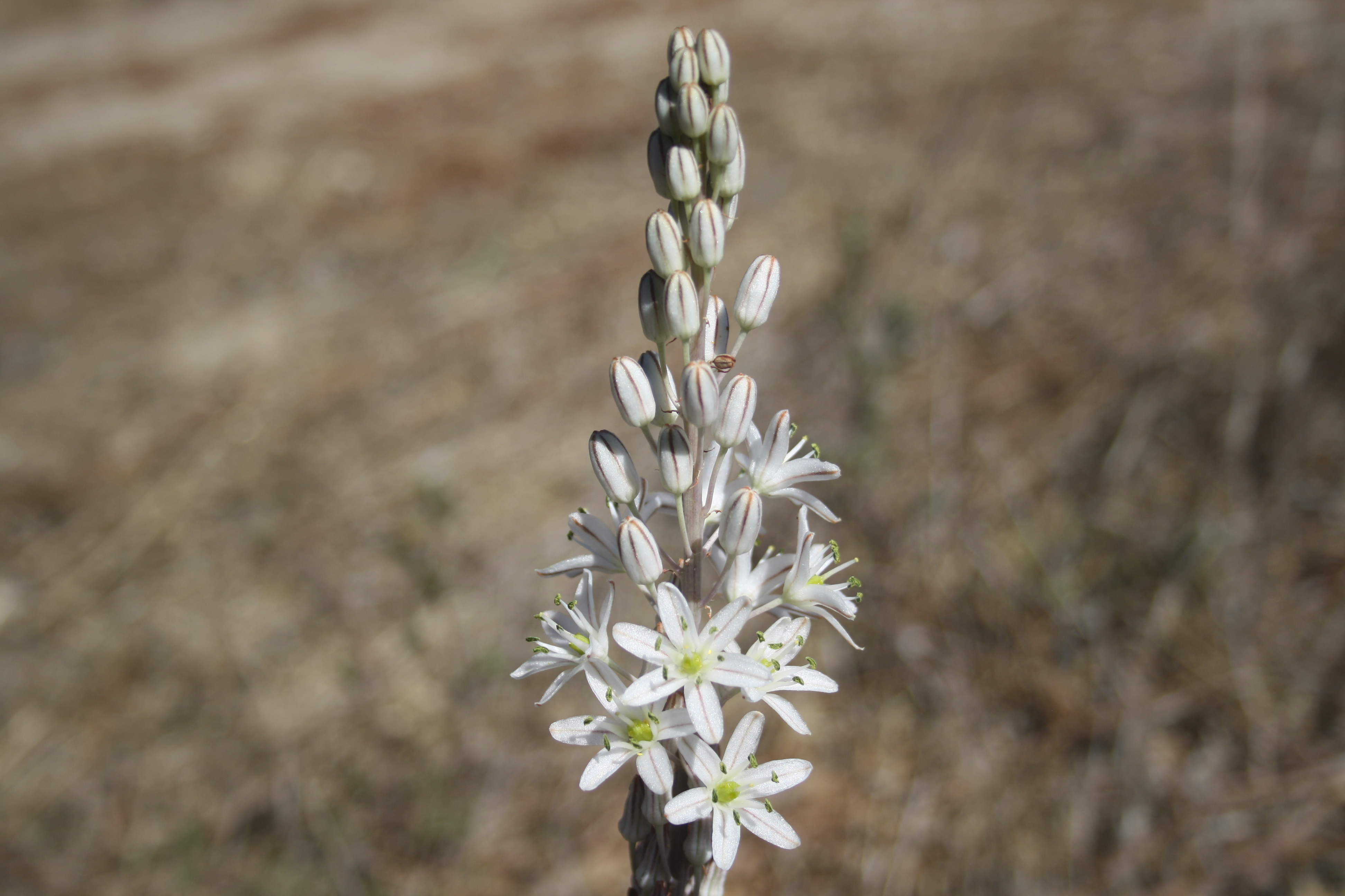 Bloem